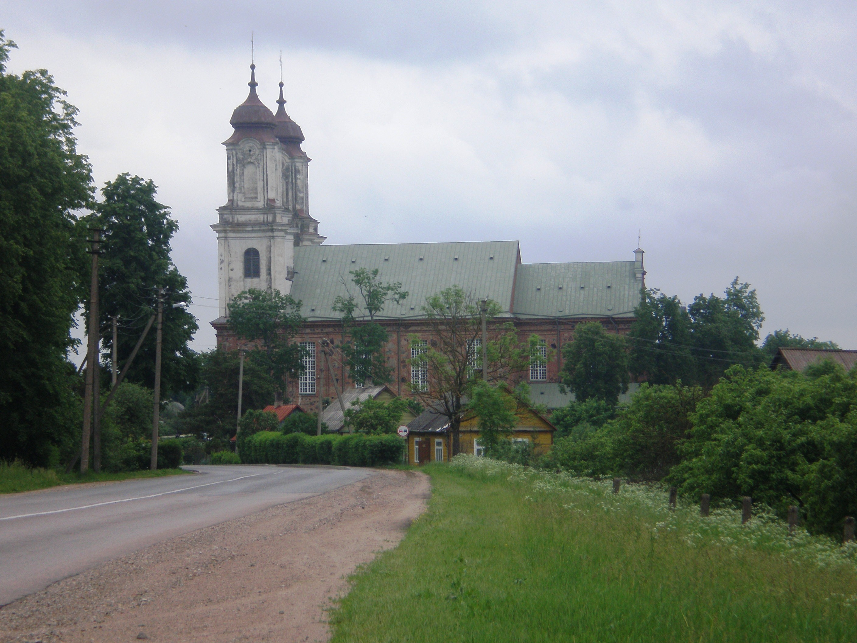 Dotnuva